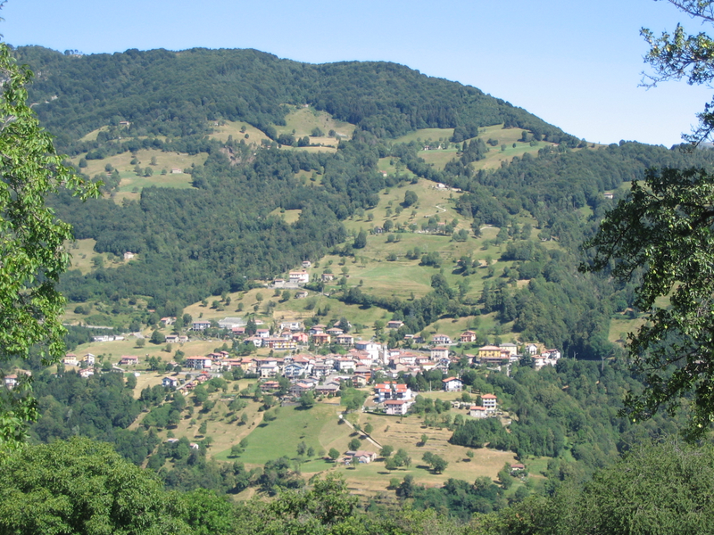 Gerosa, provincia di Bergamo, panorama.